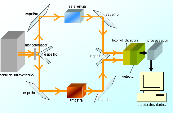 Principio de um Espectrômetro de Infravermelho IV